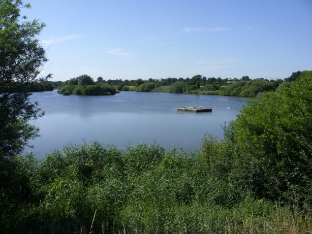 Naturschutzgebiet Neue Weser, Bremen-Obervieland, Ortsteil Habenhausen